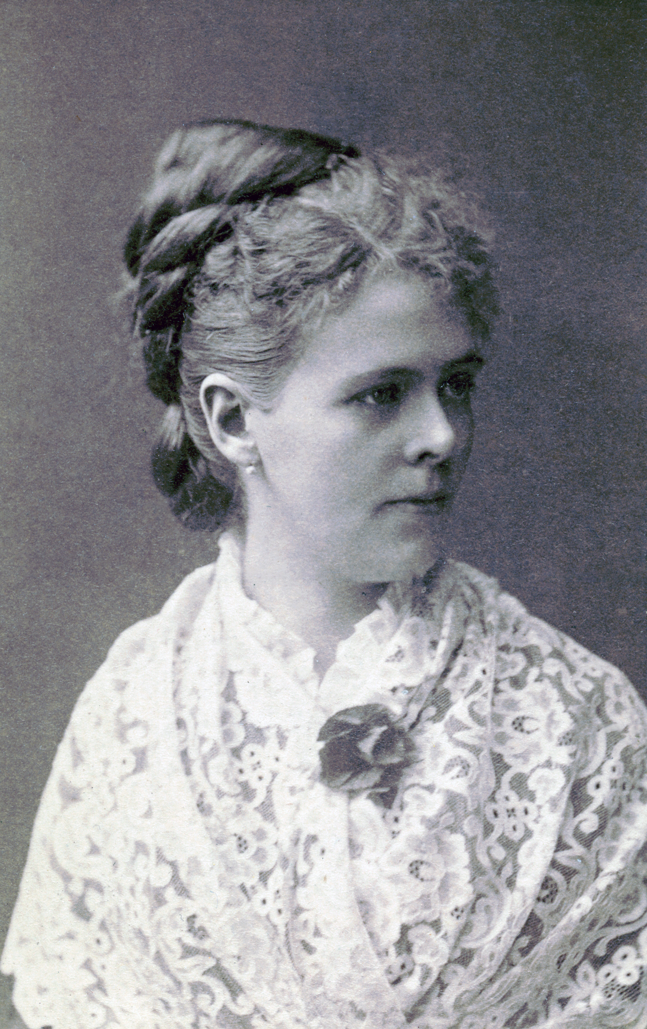 Maria Friberg, skådespelare vid Nya teatern 1882